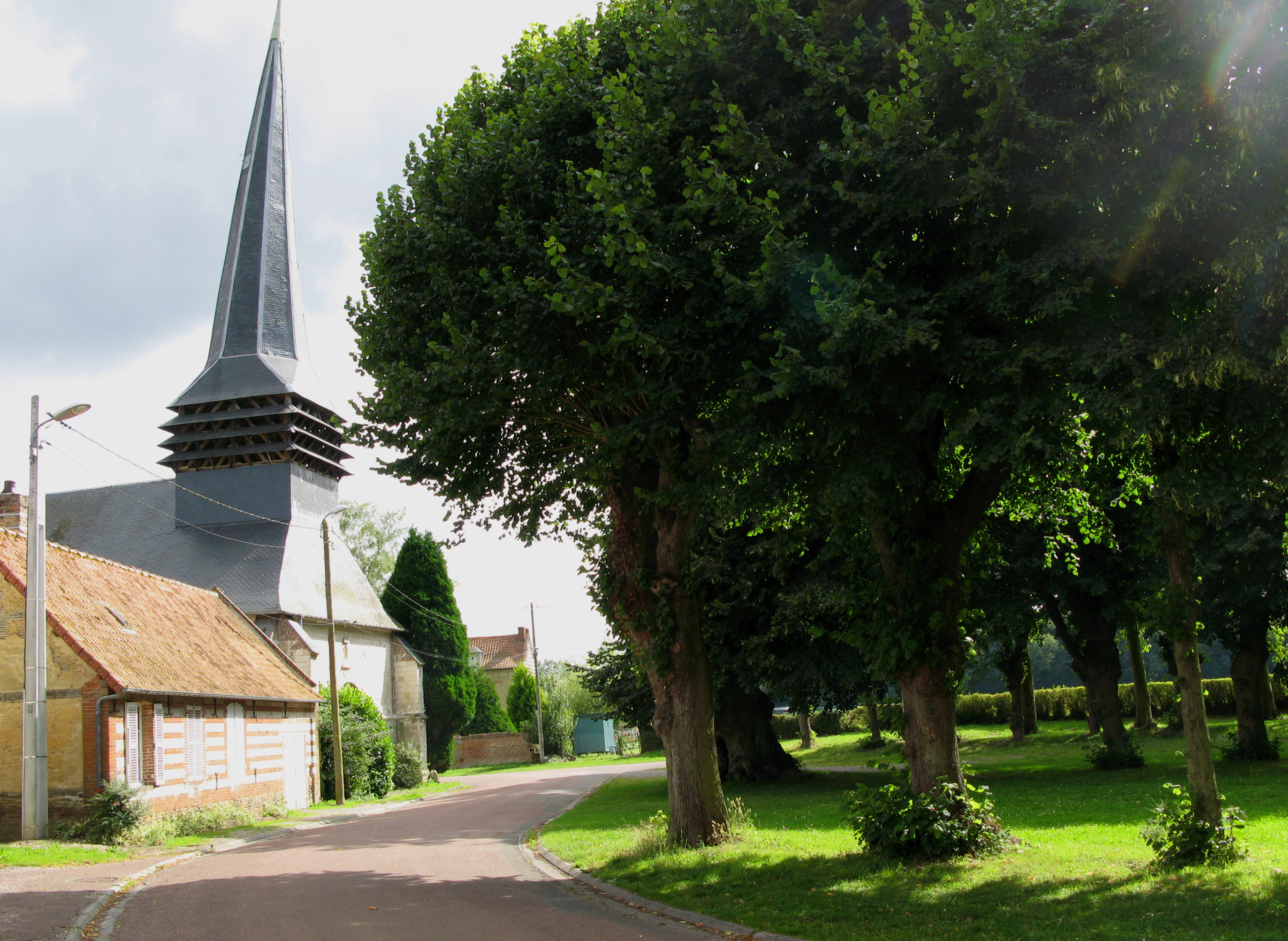 Quevauvillers (Somme, France) - L'église et la place vues en venant du château. La flèche du clocher est légèrement tordue. (Désolé pour le soleil parasitant la photo, en haut à droite !).